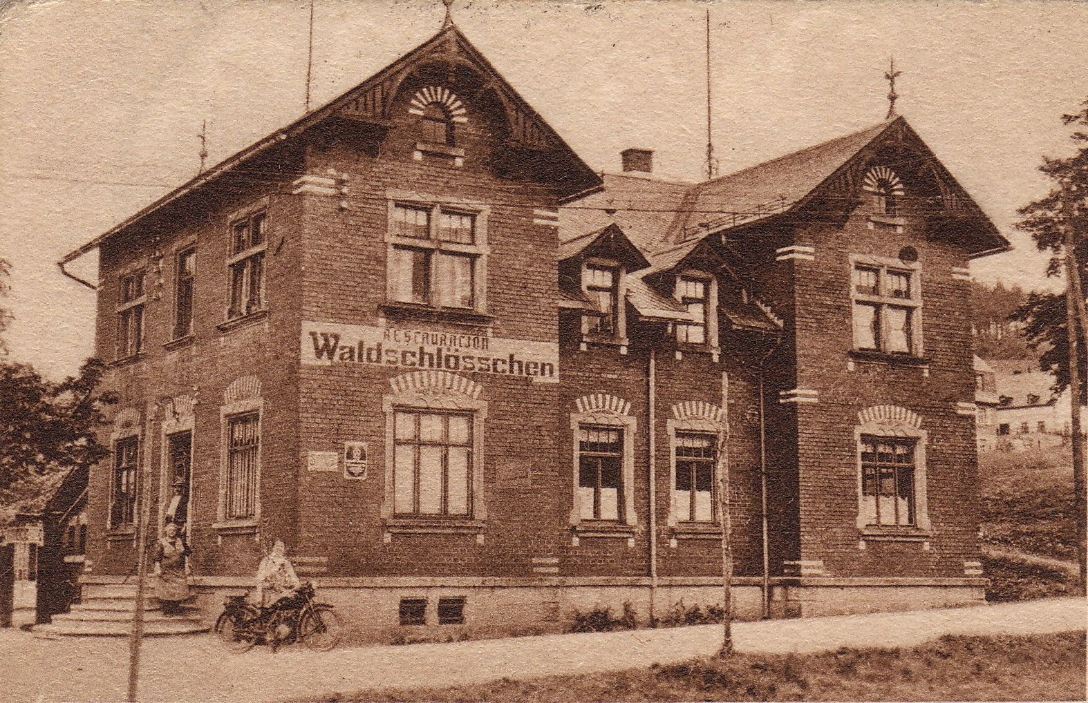 Neuheide, Ortsteil von Schönheide im Erzgebirge: Neuheider Straße 22. Auf die Adreßseite einer Ansichtskarte aus der Zeit um 1920 ließ der Besitzer drucken: Garten-Restaurant Waldschlößchen (Besitzer Ernst Schlesinger) mit Gondelteich, Kegelbahn und Gesellschaftssaal. Neuheide bei Schönheide im Erzgebirge am Fuße des Kuhbergs – Idyllischer Ausflugsort. Fernruf Schönheide Nr. 324.Das sächsische Landesamt für Denkmalschutz stuft das Gebäude als Kulturdenkmal ein mit dieser Begründung: „Ehemaliges Gasthaus (heute Wohnhaus); von ortshistorischer Bedeutung.“ Es steht auf der Liste der Kulturdenkmale in Schönheide. Zu Beginn des 21. Jahrhunderts ist es ein besonders im Dachgeschss umgebautes Mehrfamilienwohnhaus.